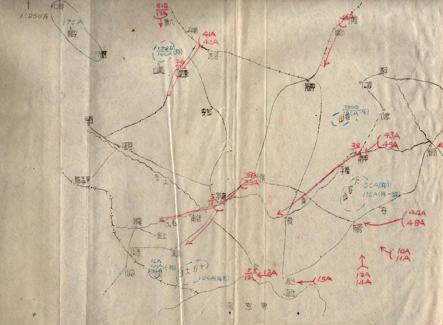 中文（台灣）: 國軍入越形勢圖(1949年上旬)